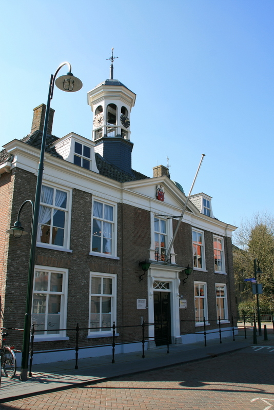 Dinteloord - Westervoortstraat 1 - Raadhuis